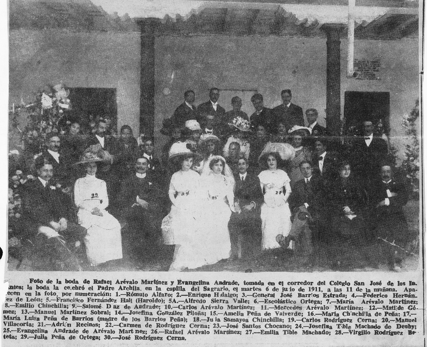 Casamiento de Rafael Arévalo Martínez en 1911. Colegio San José de los Infantes. Entre los presentes están José Santos Chocano, Virgilio Rodríguez Beteta y Adrían Recinos.